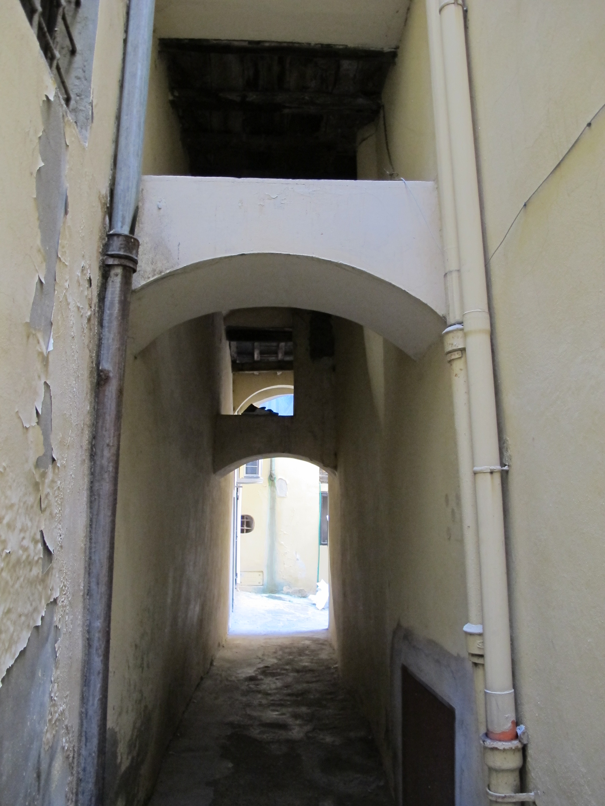 Vicolo dello scandalo 03.1